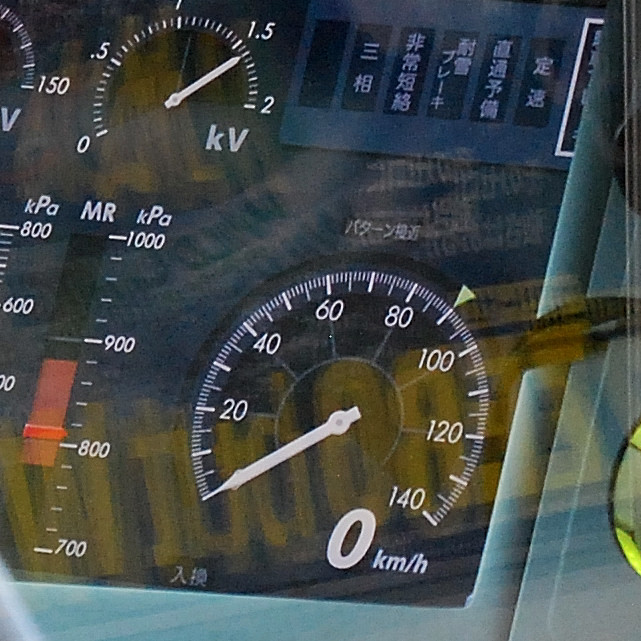 京浜東北線、E233系に使用されているD-ATCの表示（乗務員室の窓越しから撮影しその後トリミング）